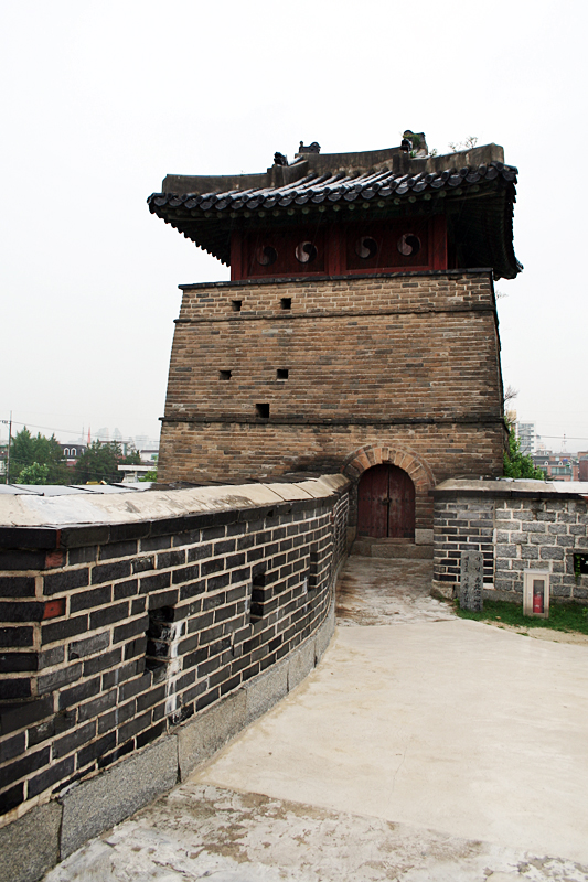 Seobugongsimdon.